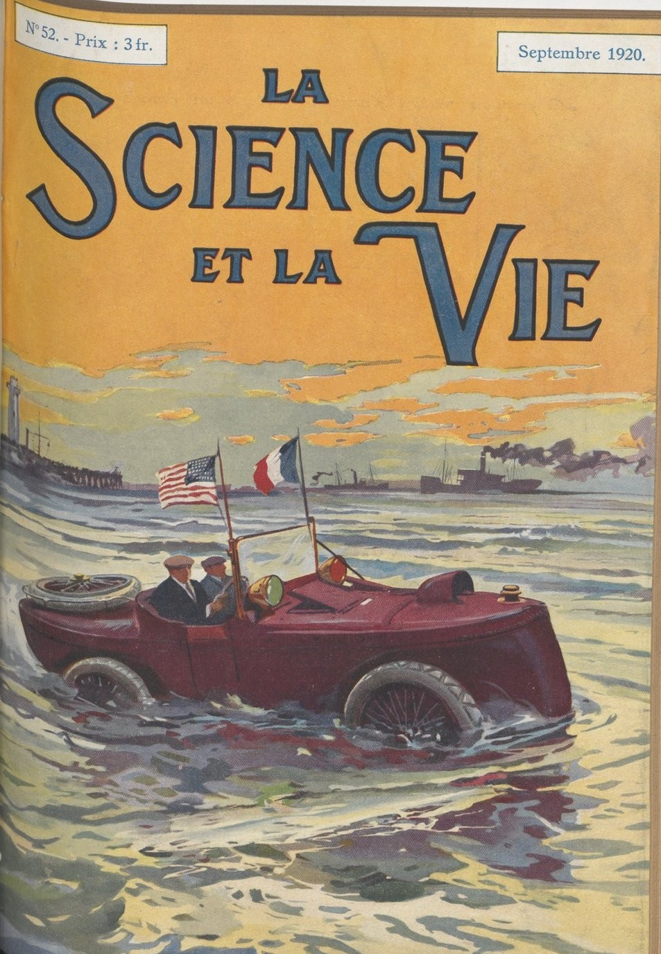 Couverture de La Science et la Vie n°52, Paris, septembre 1920. Sujet de la une : La Sirène, automobile flottante conçue par un ingénieur américain (p. 209).